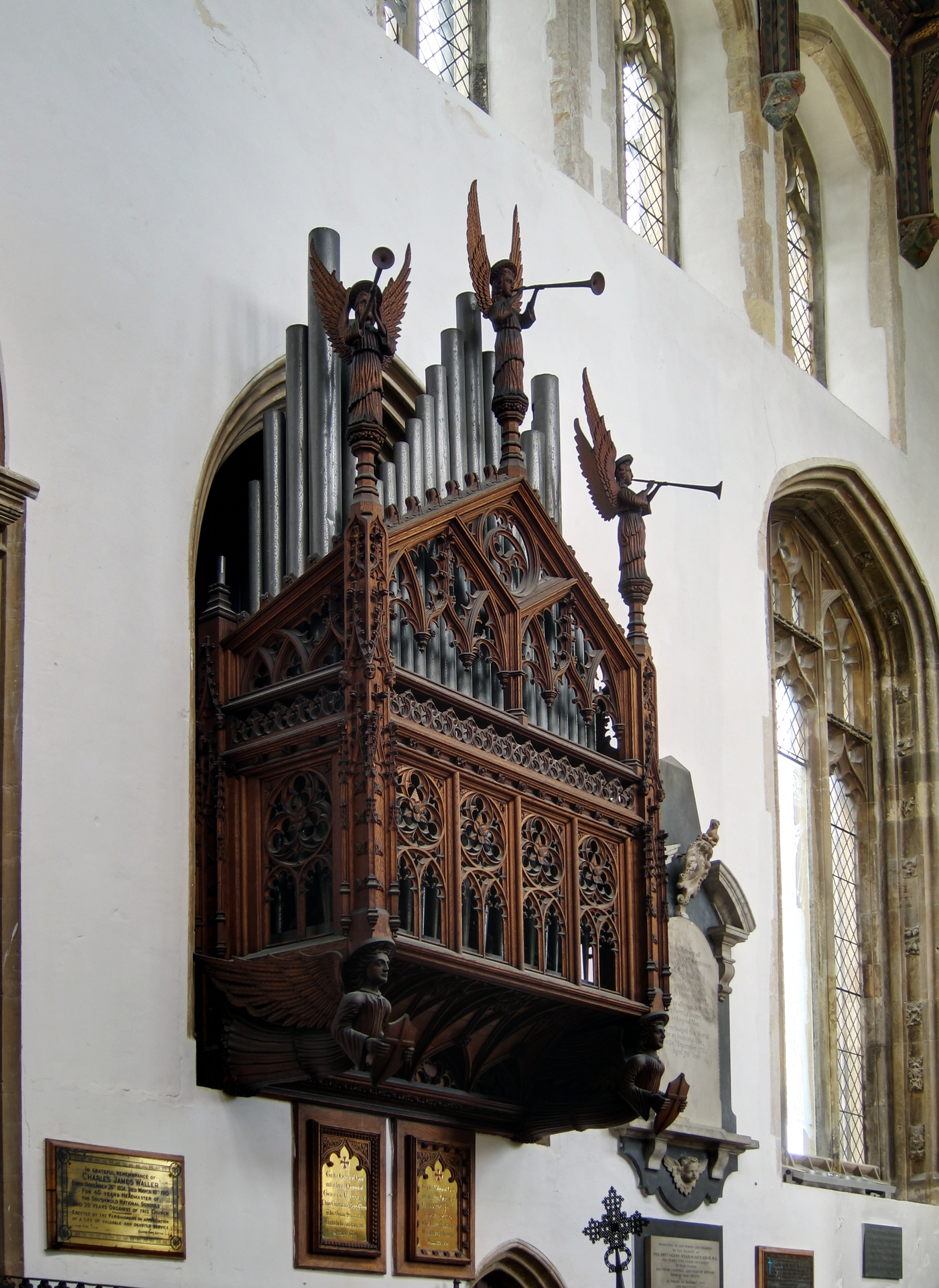 L'orgue de St. Edmund's Church à Southwold.